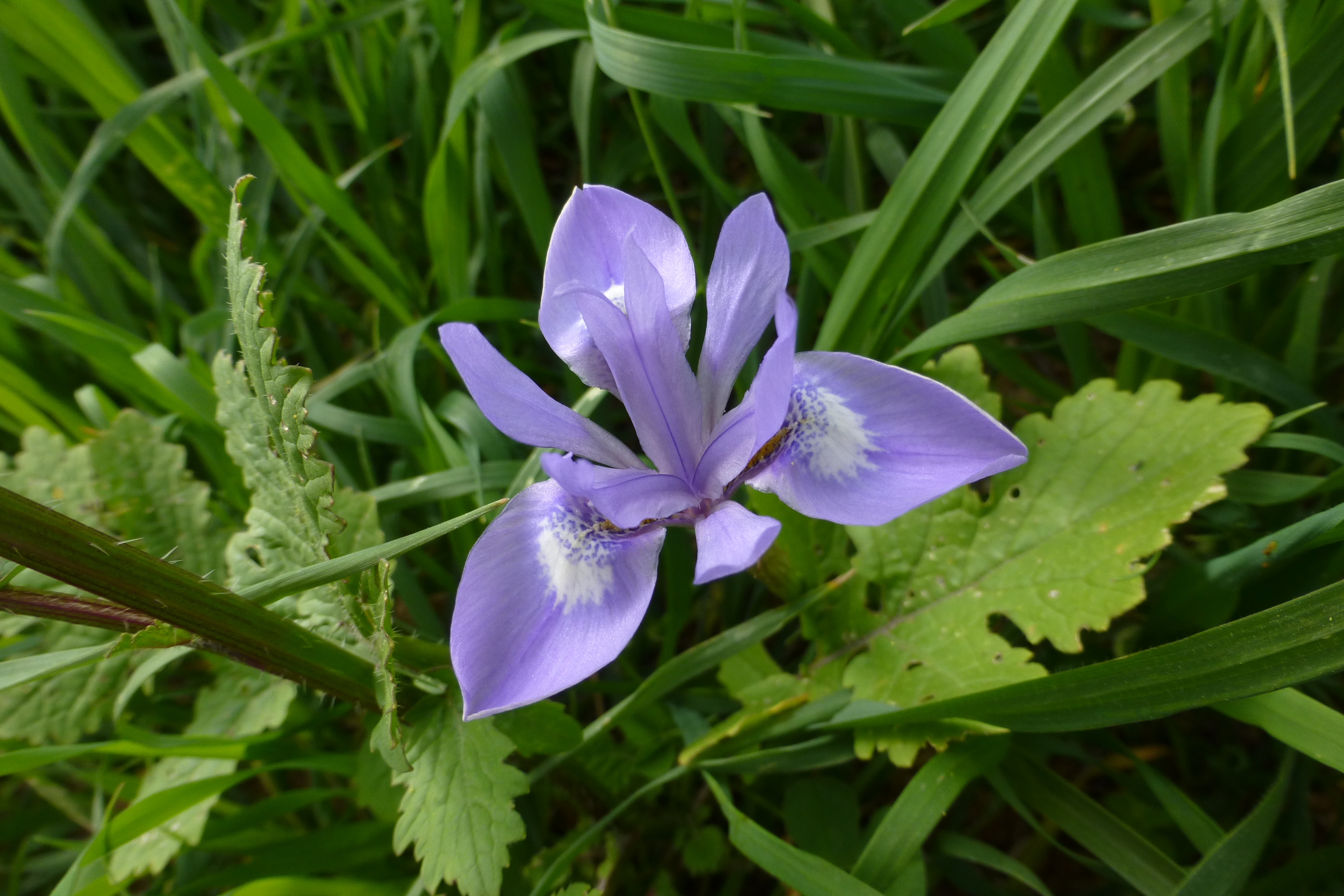 שמורת טבע בעמק זבולון, מזרחית לקריית ביאליק. השמורה כוללת הן את המעיינות והביצות המהווים את מקורו של נחל נעמן והן את האתר הארכאולוגי תל אפק. השמורה הוכרזה ב-1979 והיא משתרעת על פני 660 דונם. ב-1996 הוכרה השמורה כ"אתר רמסר" בהתאם לאמנת רמסר לשימור ולפיתוח בר-קיימא של בתי גידול לחים.